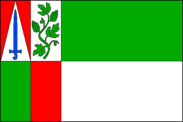 Vlajka obce Liběšice